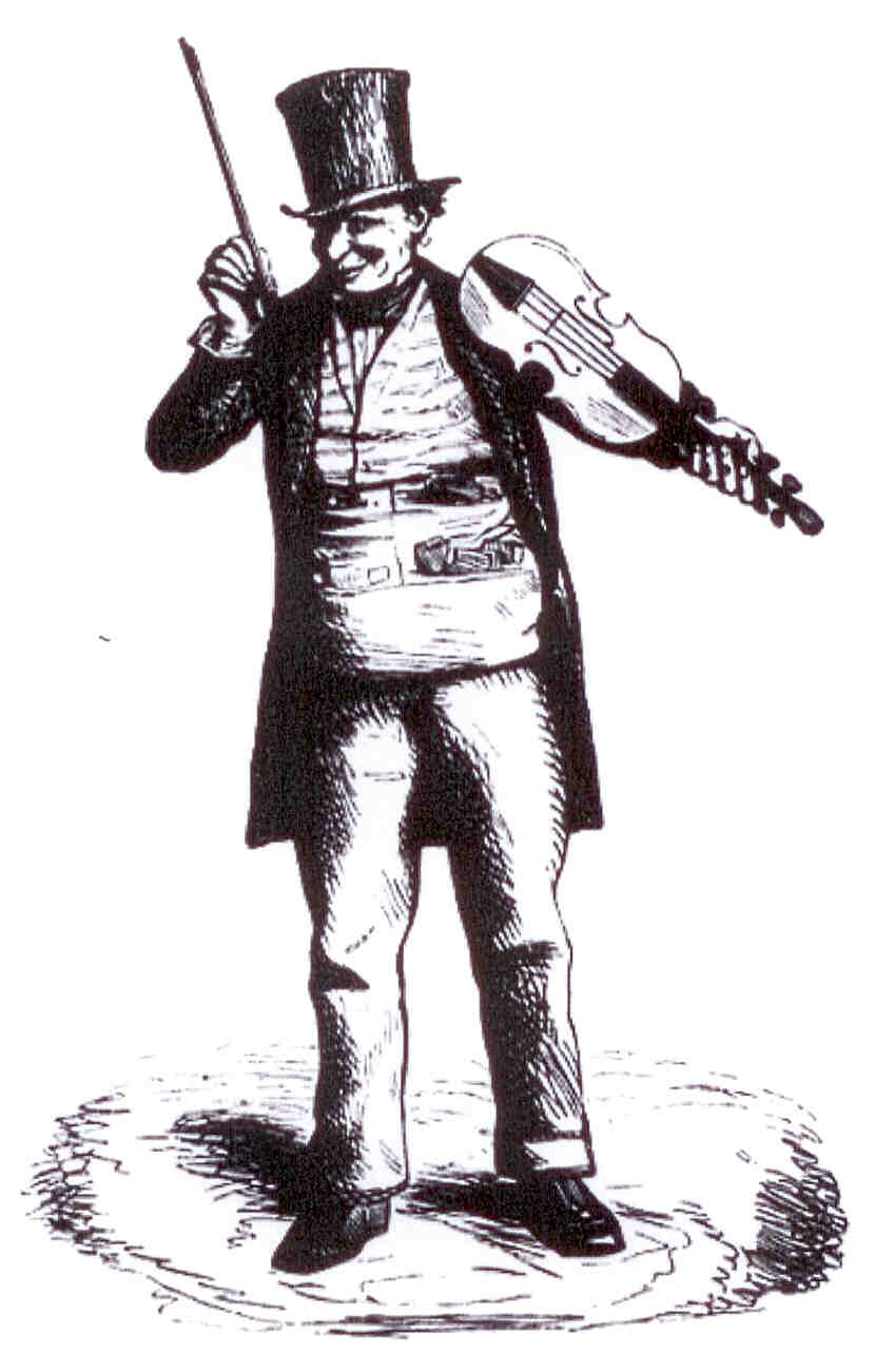 Un violoneux chanteur des rues de Paris. L'artiste illustre ici une histoire survenue vers 1789. Il est possible qu'il a donné au personnage le costume qu'il pensait porter à cette époque et pas en 1845.